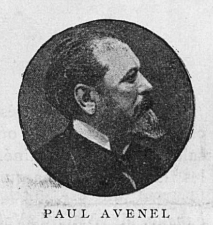 Portrait photographique du chansonnier Paul Avenel.